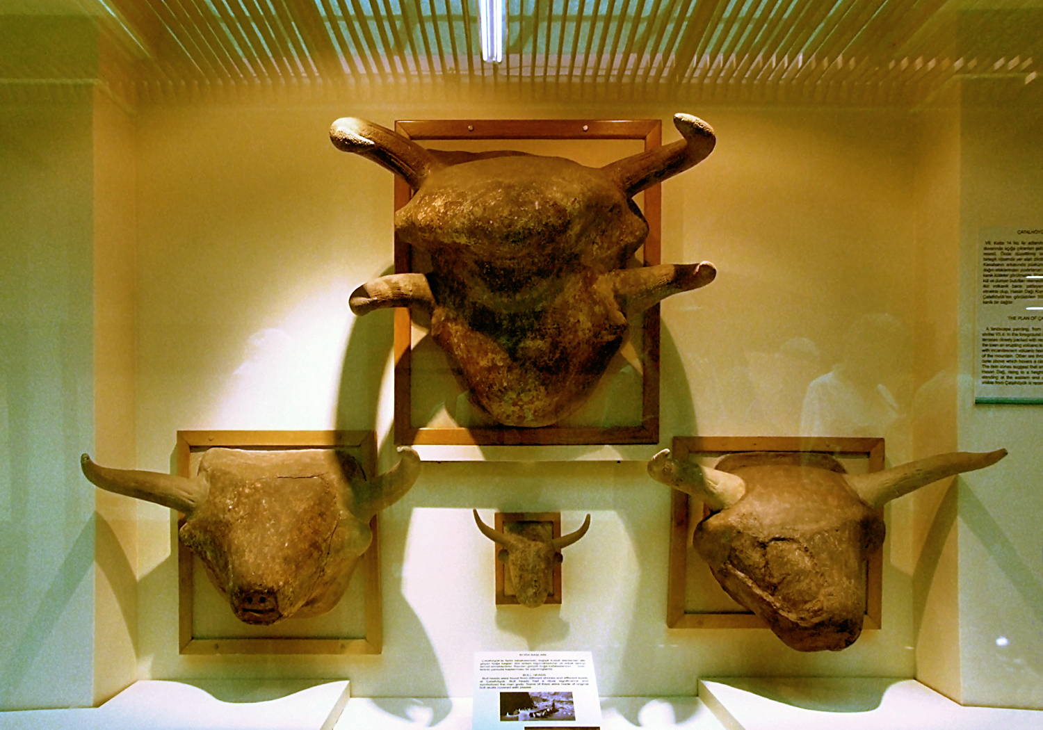 Głowy byków z Çatalhöyük (Turcja), neolit, obecnie w Muzeum Cywilizacji Anatolijskich w Ankarze; Bull heads from Çatalhöyük (Turkey), neolithic, today in Museum of Anatolian Civilizations in Ankara